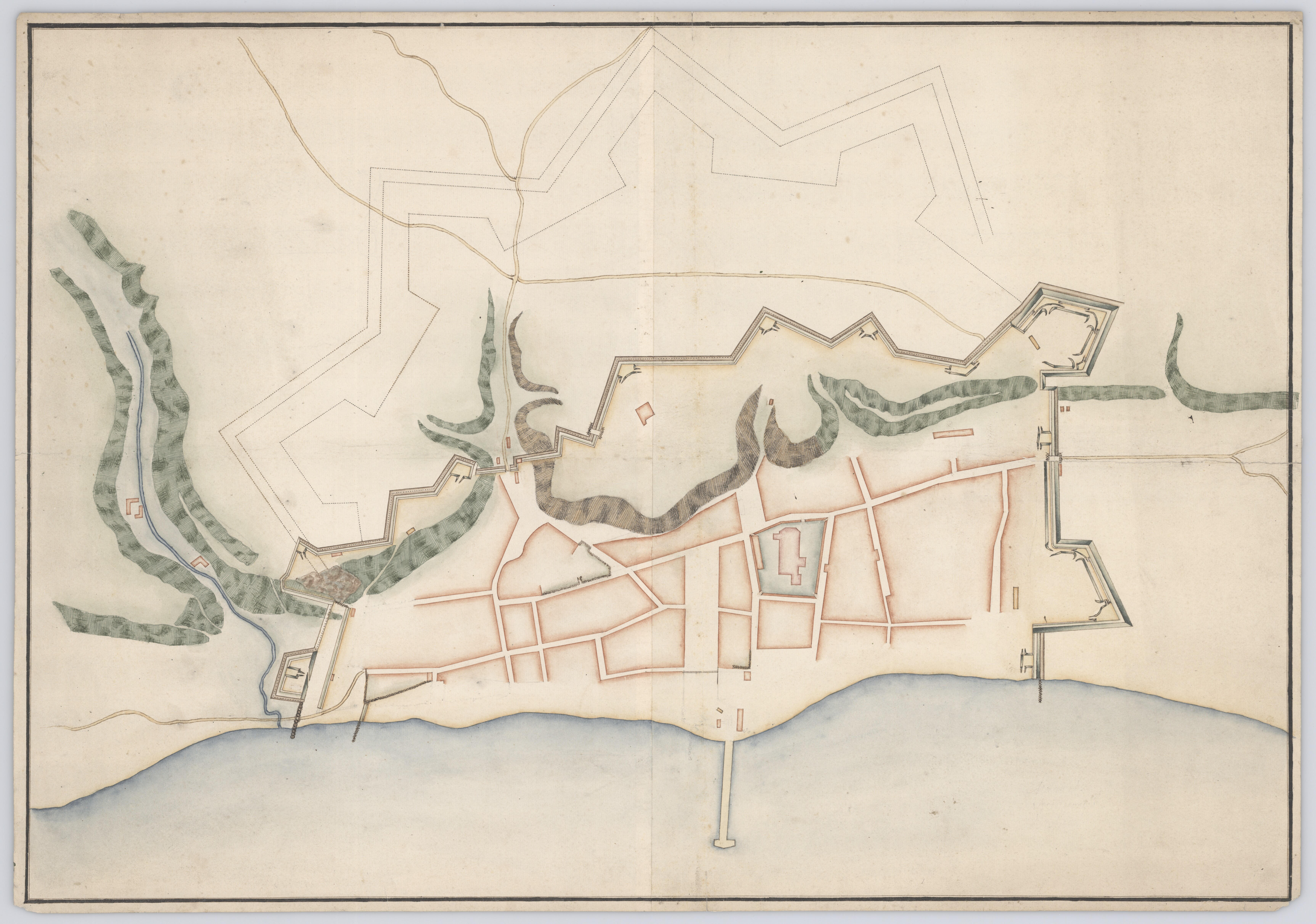 Helsingborgs befästningar under den danska ockupationen 1709-1710 under Stora nordiska kriget.